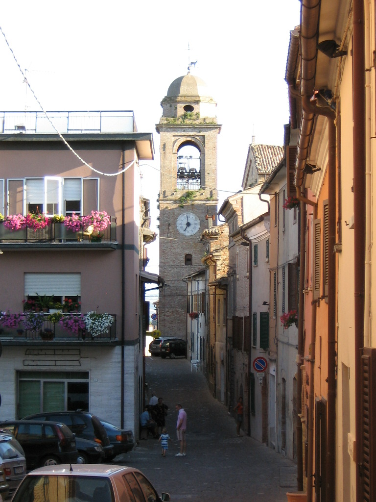 Campanile di San Minchele Arcangelo, Mondaino (RN), Italy